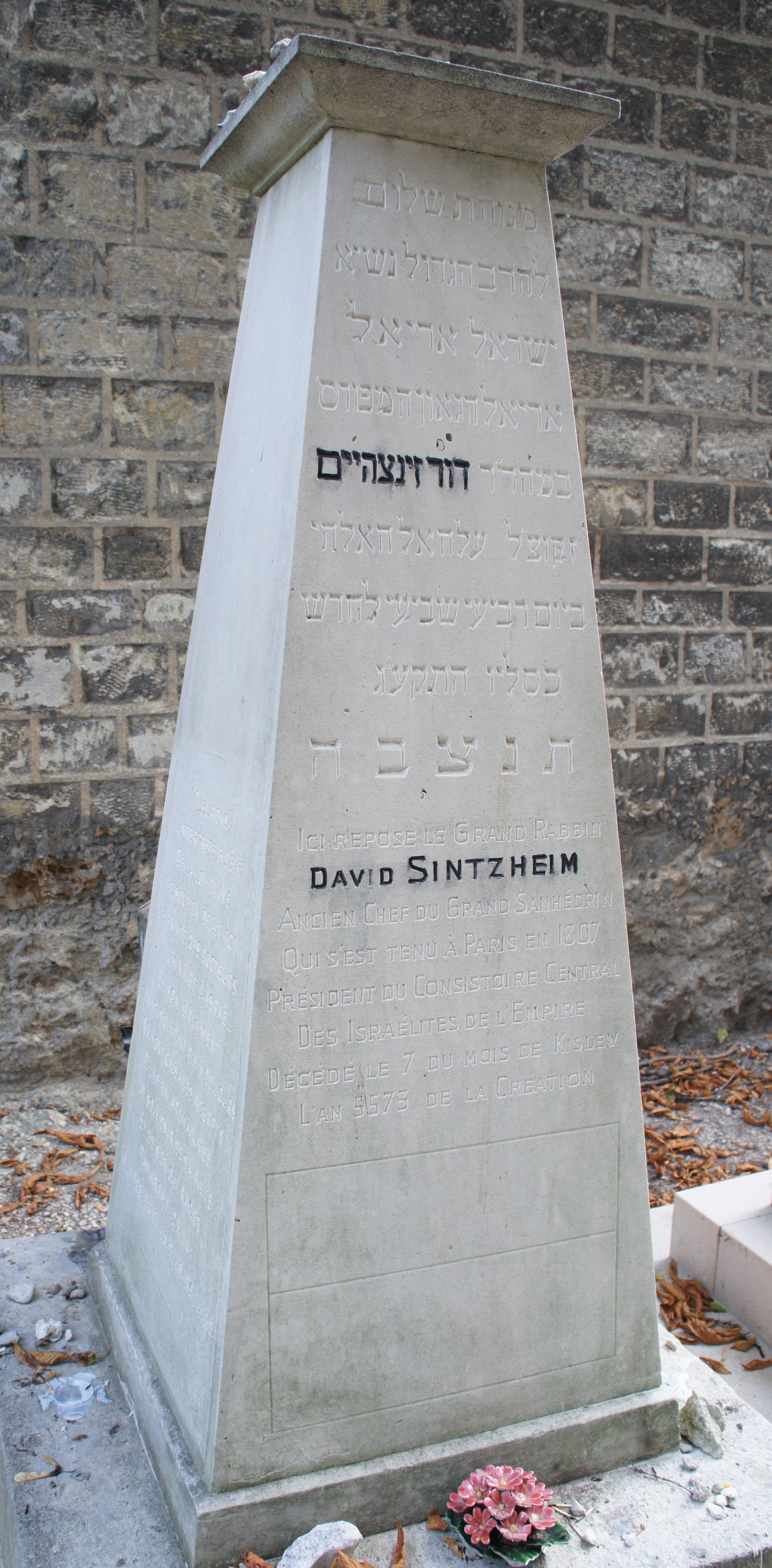 Grabstein von Rabbiner Josef-David_Sinzheim (1745–1812) auf dem Friedhof Père Lachaise in Paris